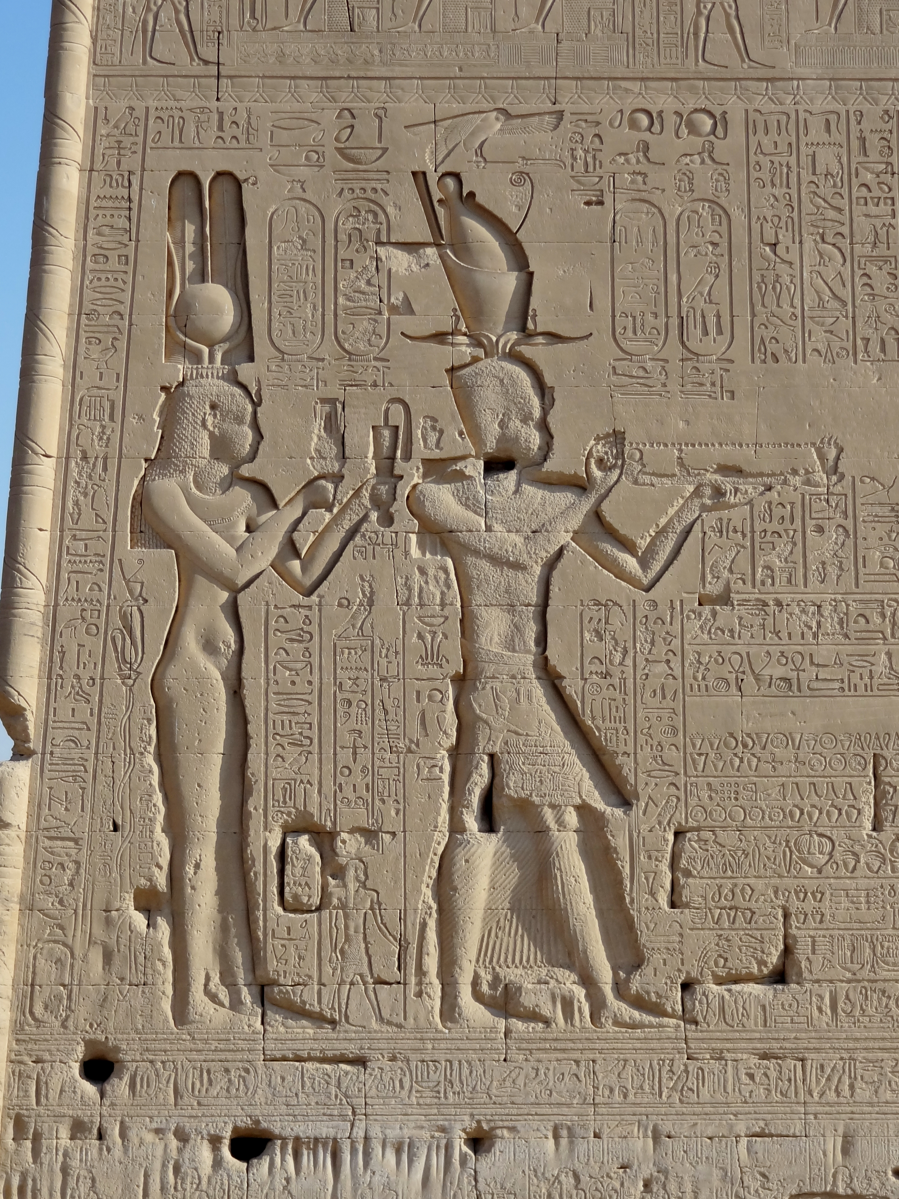 Relief mit Kleopatra VII. und ihrem Sohn Cäsarion an der Südseite des Hathor-Tempels von Dendera, Ägypten